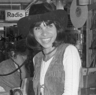 Die mexikanische Sängerin ist zur Autogrammstunde bei Kihr-Goebel.